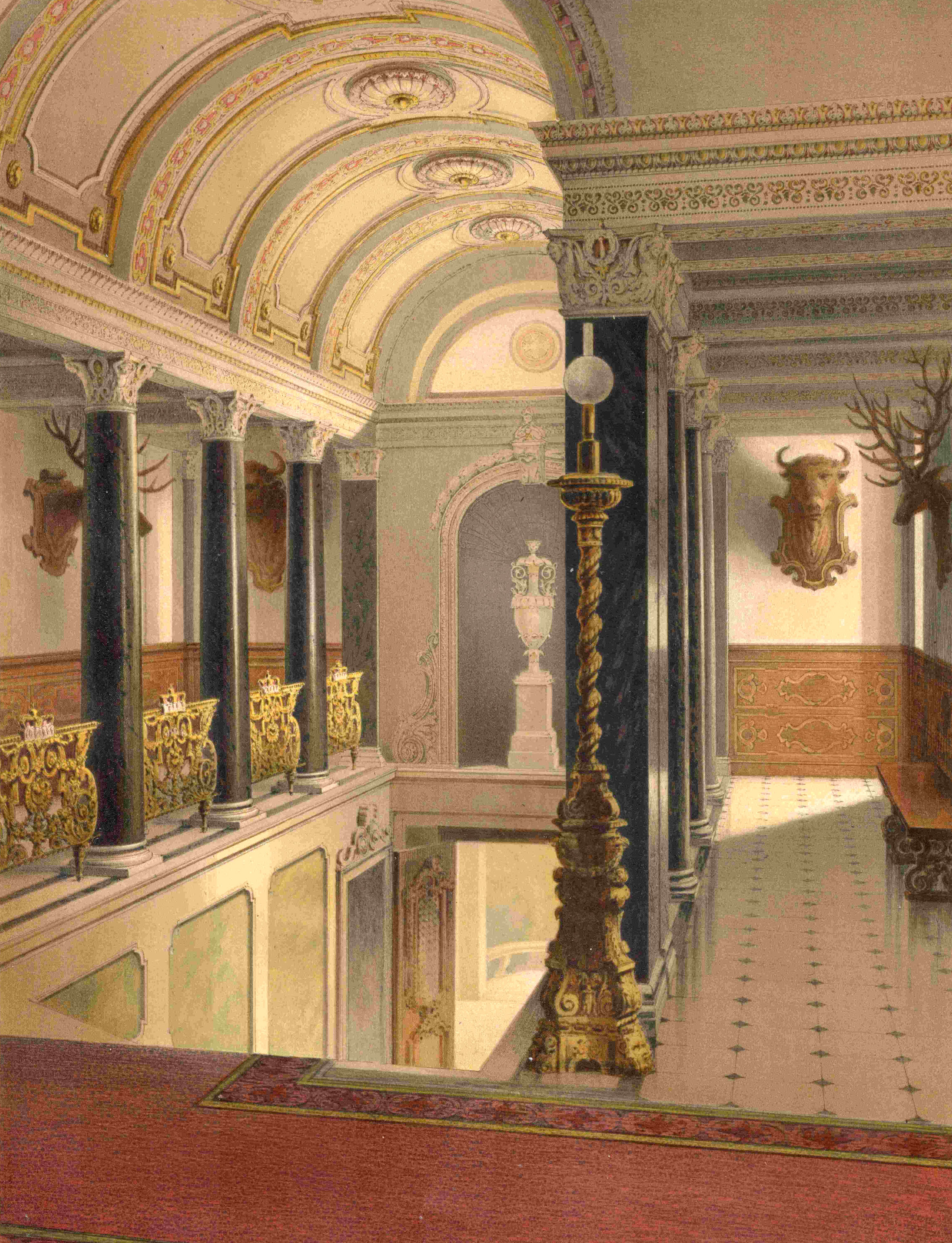 Der Eingangstreppenraum im Jagdschloss Klein Glienicke, Farblithografie von Ferdinand von Arnim, nach 1862